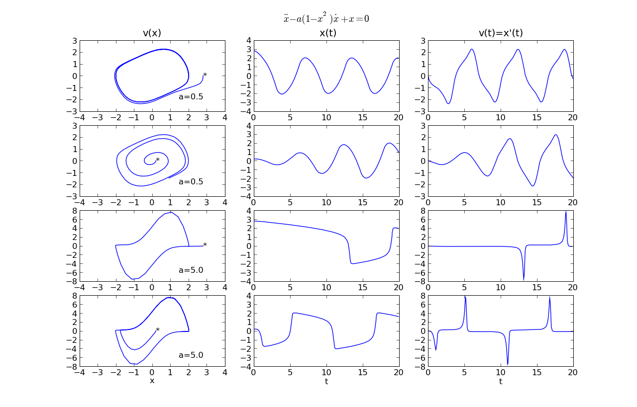 Lösungen der homogenen Van-der-Pol-Gleichung, bei variation des Parameter a und des Startwertes